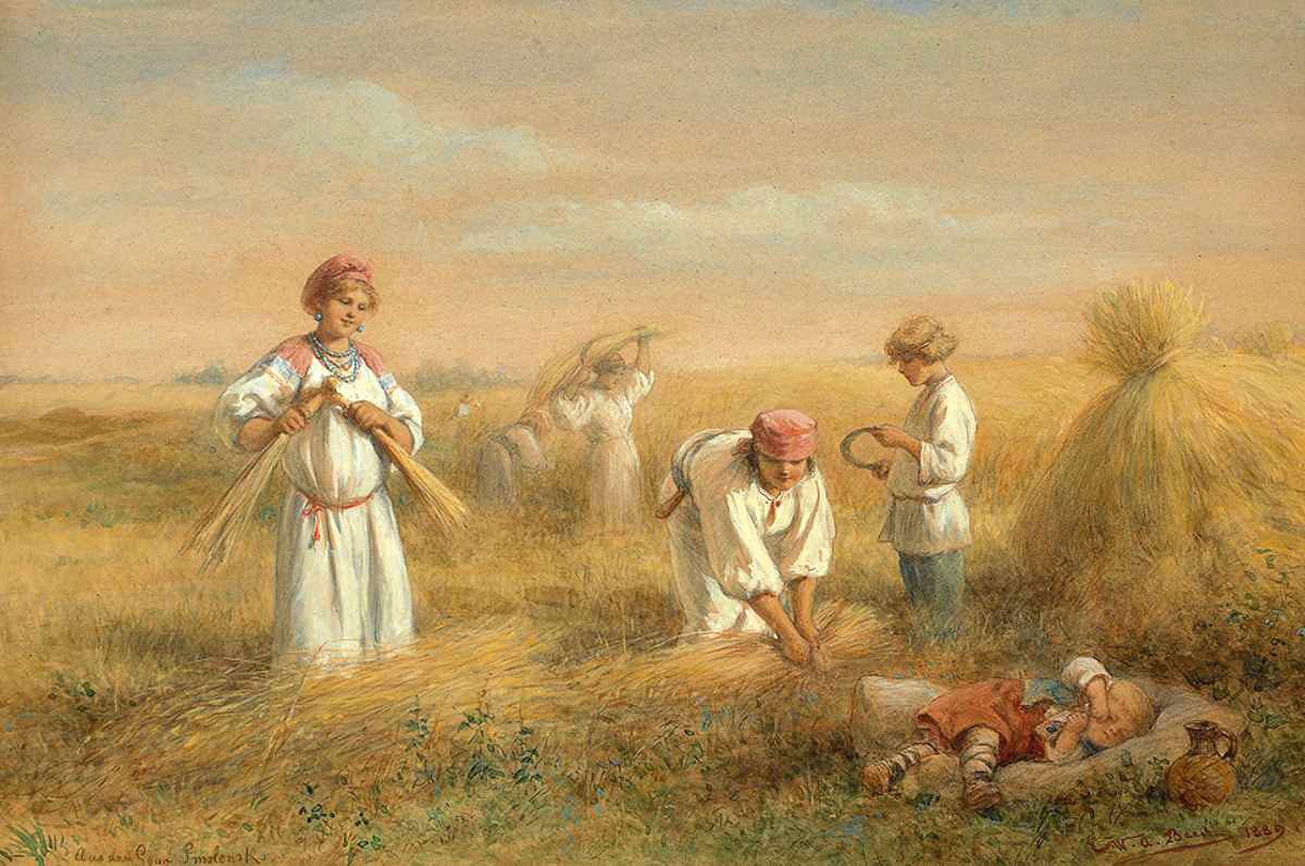 "В Смоленской губернии". Русский крестьянская семья на жатве. Акварель / гуашь. 18 х 27 см.